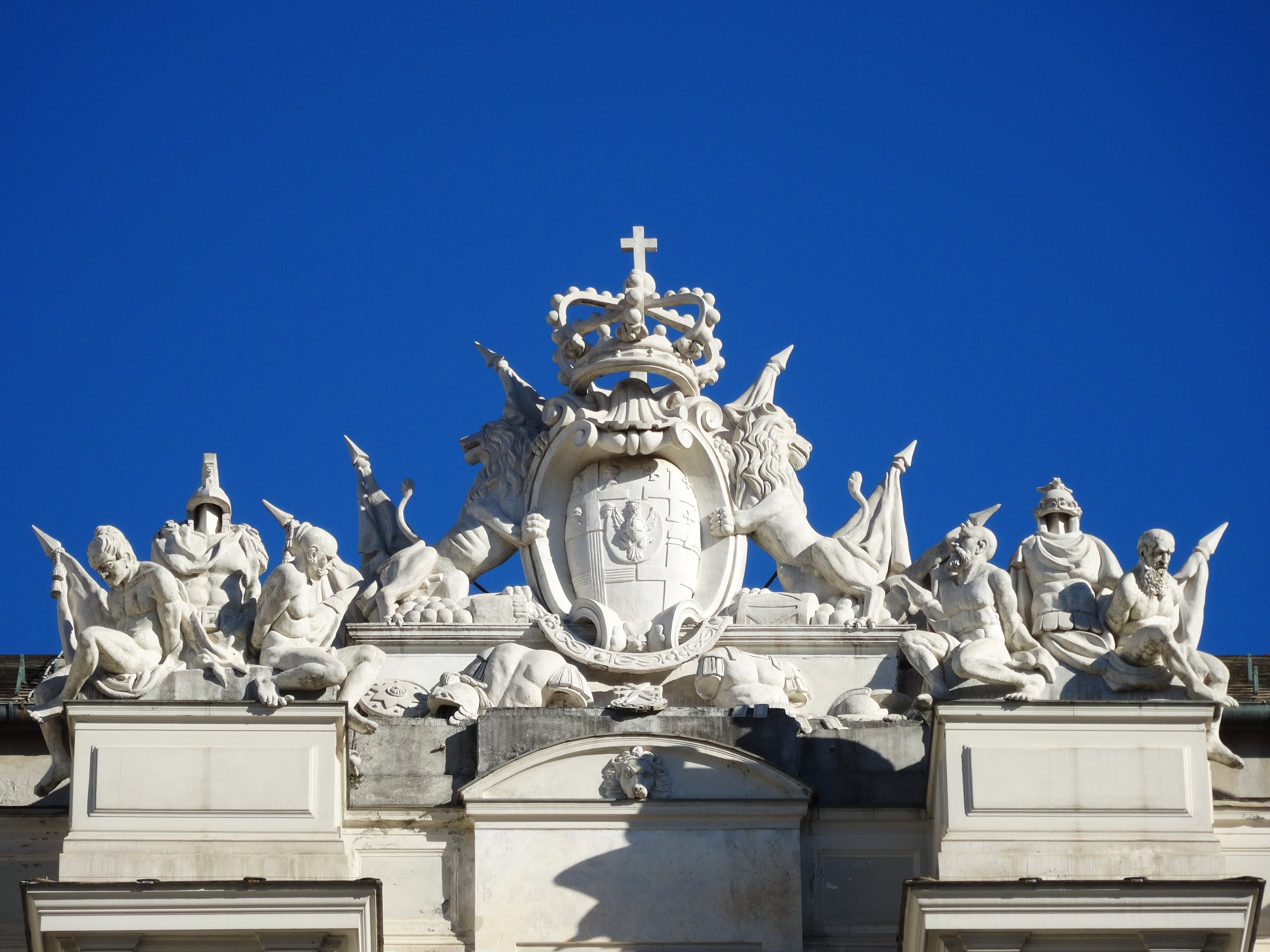 Palazzo Ducale di Genova This is a photo of a monument which is part of cultural heritage of Italy.